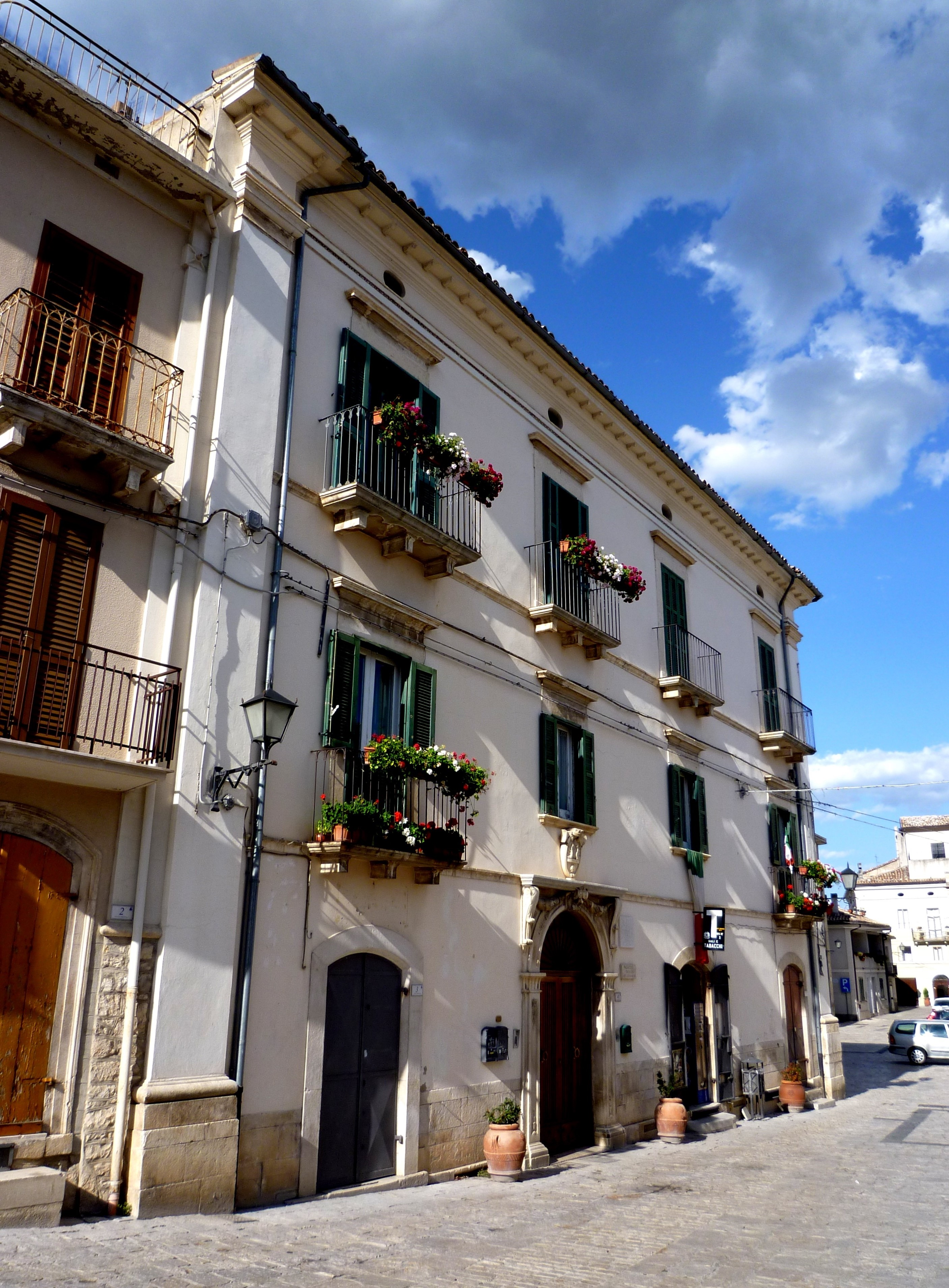 Palazzo dei Baroni Tabassi, Lama dei Peligni, Chieti.